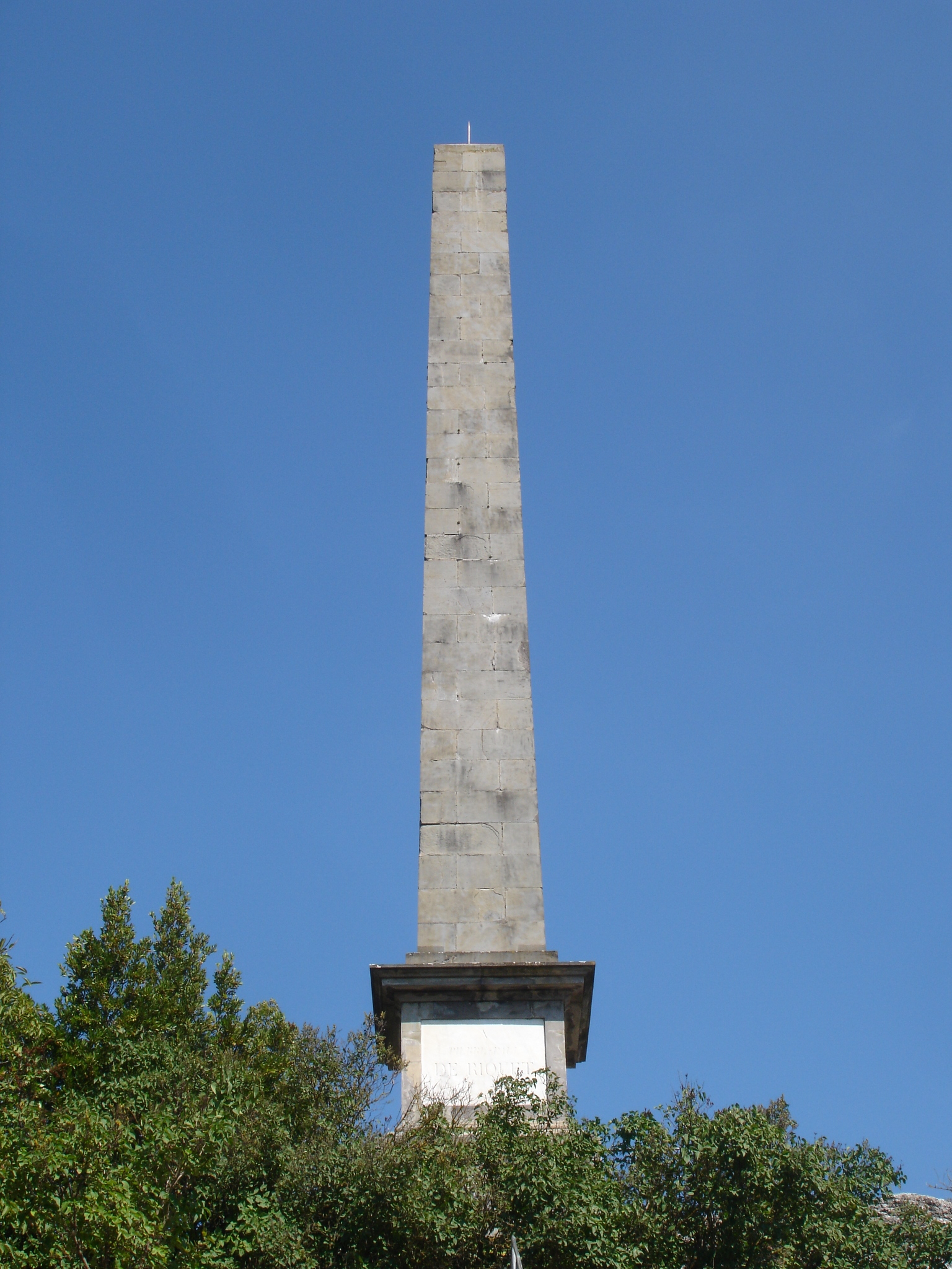 France, Aude (11), Seuil de Naurouze, Obélisque de Riquet